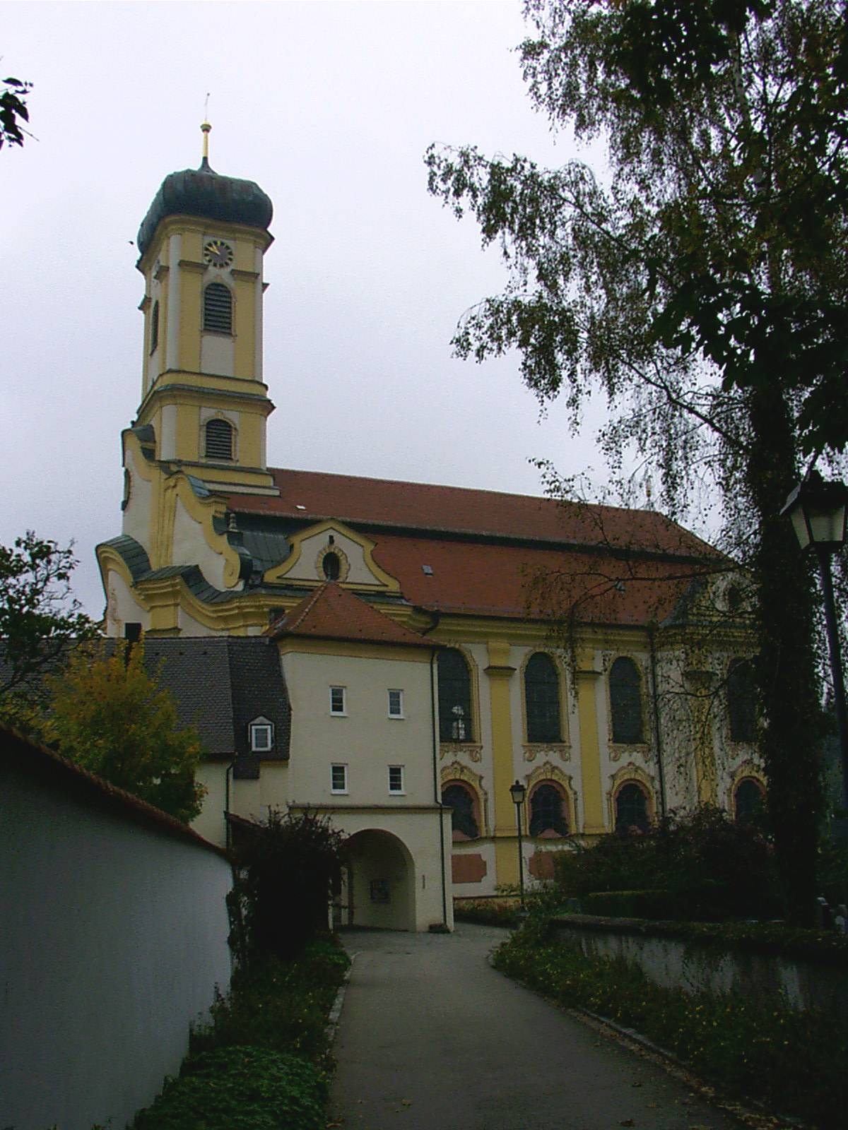 Wallfahrtskirche Maria Steinbach (Zur schmerzhaften Muttergottes) in Legau, Ortsteil Maria Steinbach